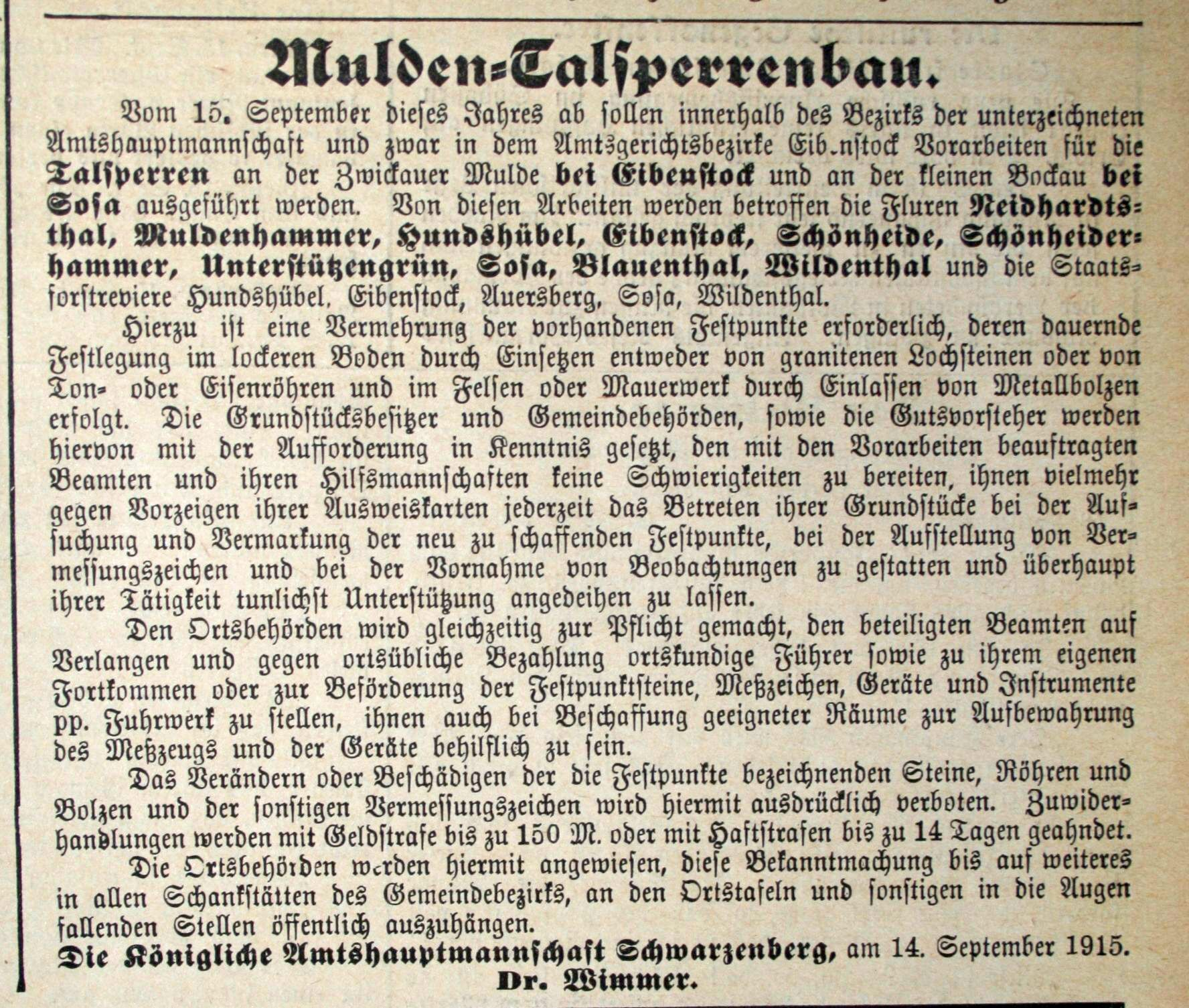 Schönheide im Erzgebirge: Im September 1915 wurde in Schönheider Wochenblatt von der Königlichen Amtshauptmannschaft Schwarzenberg (entspricht ungefähr einer heutigen Kreisverwaltung) bekannt gemacht. Schon im Jahr 1905 gab es Pläne für die Eibenstocker Talsperre: So wurden deswegen im Jahr 1905 Pläne für eine Erweiterung der Papierfabrik Neidhardtsthal fallengelassen. (Siehe: Gerhard Ebisch: Alte Produktionsstätten der Holzschliff-, Pappen- und Papierindustrie in den Tälern der Zwickauer Mulde, des Schwarzwassers und der Mittweida und ihren Nebenflüssen. Schwarzenberg 2001, Seite 76) Bis zum Bau der Eibenstocker Talsperre dauerte es noch 60 Jahre: Baubeginn war 1974.